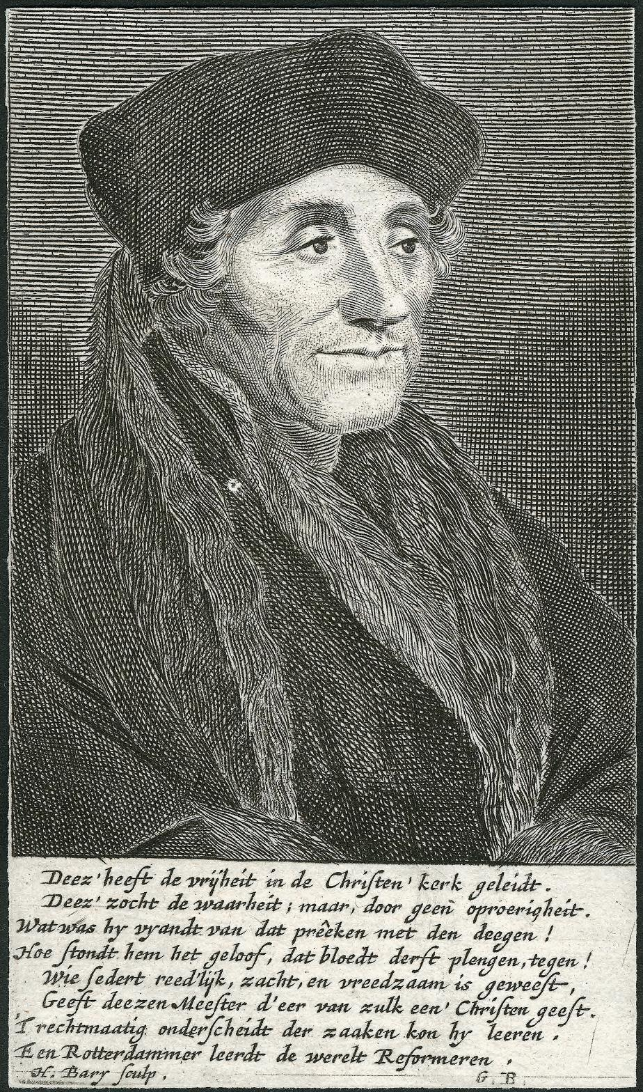 Gravure van Desiderius Erasmus door Hendrik Bary